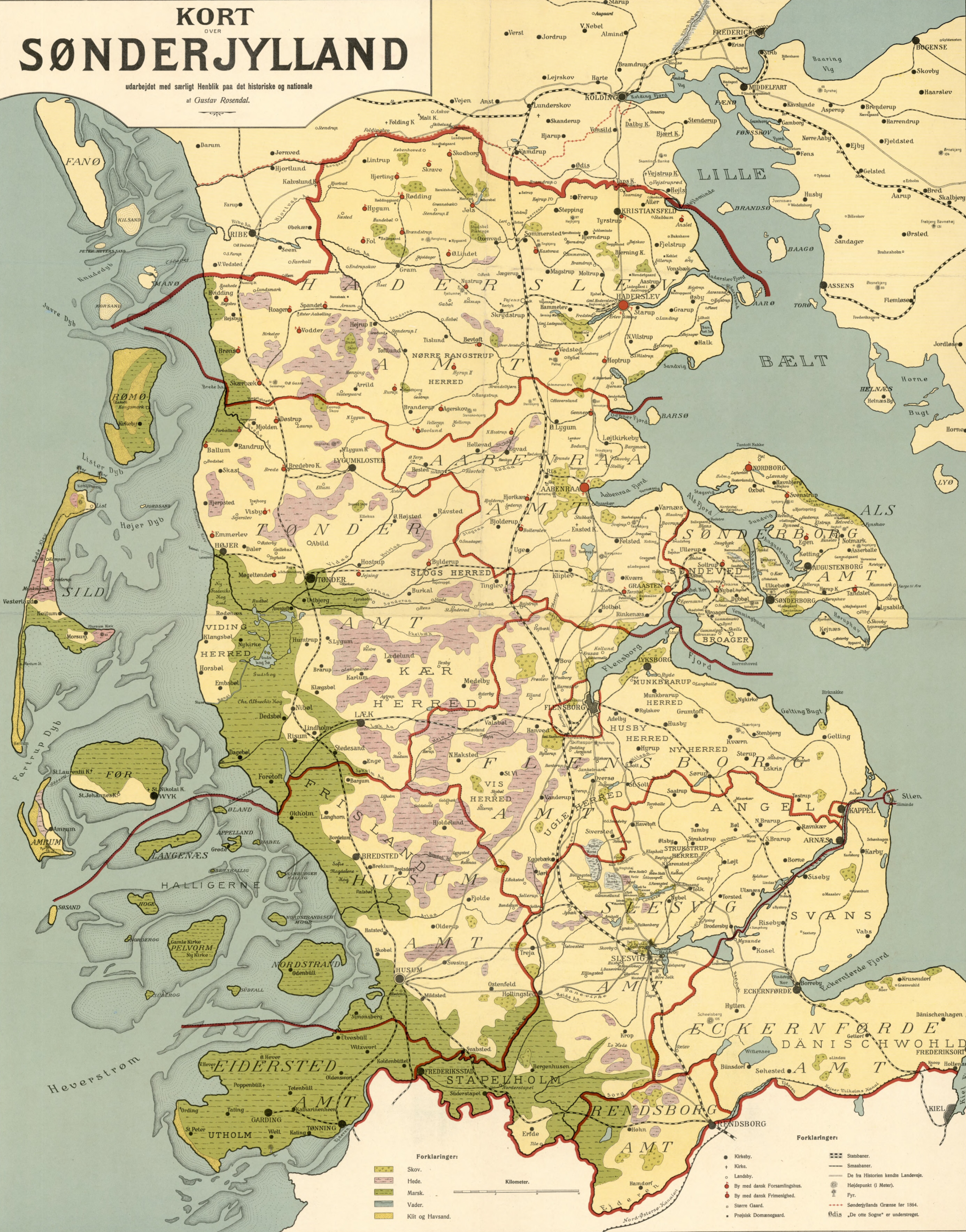 Gustav Rosendal - Sønderjylland med amtsgrænserne, fra 1913